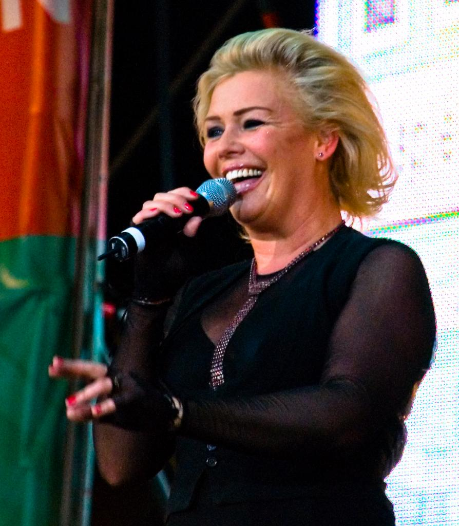 British singer Kim Wilde performing at FFH Wolkenkratzer Festival (Frankfurt, Germany)